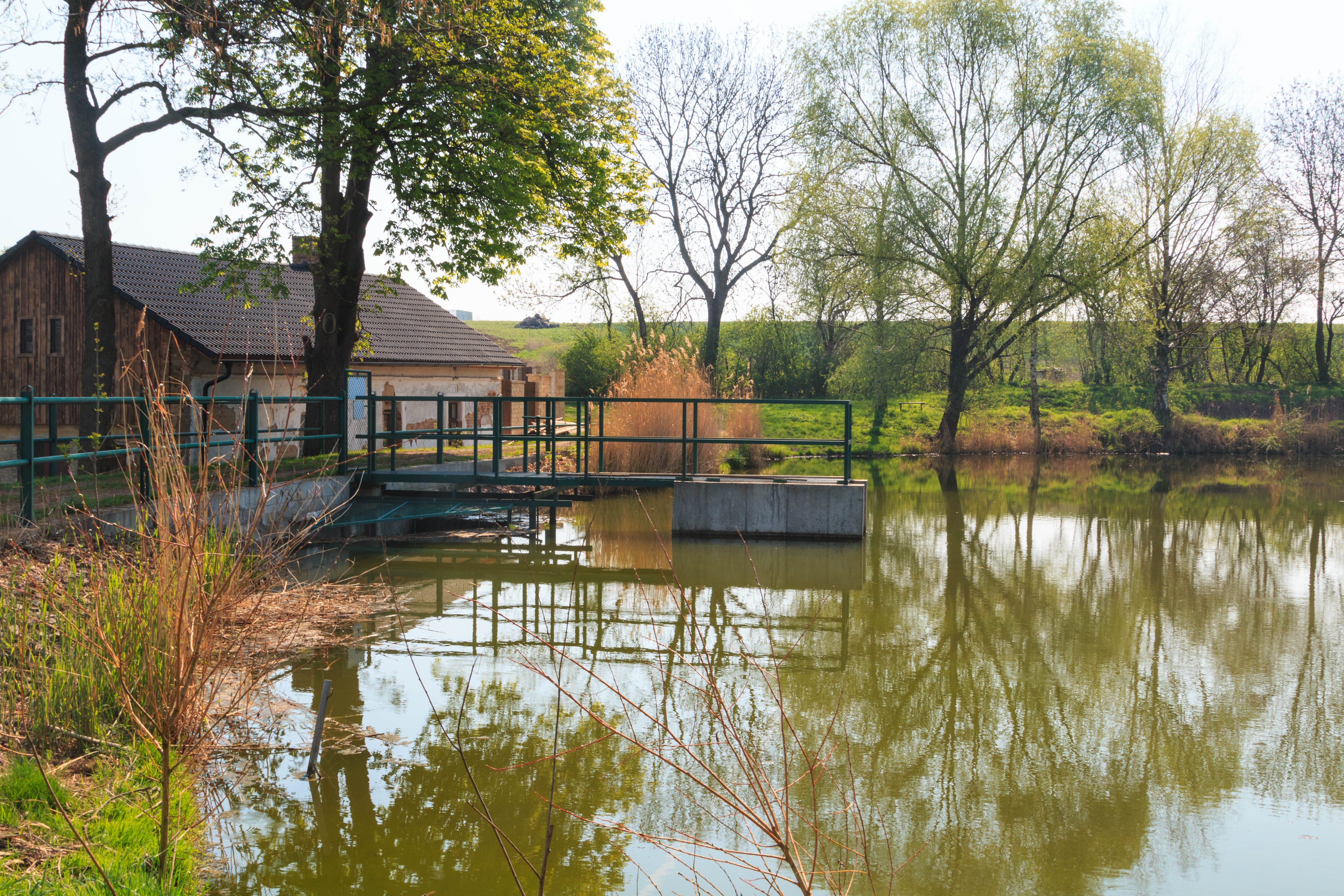 Rybník v Dubanech u Pardubic Project: Vodstvo